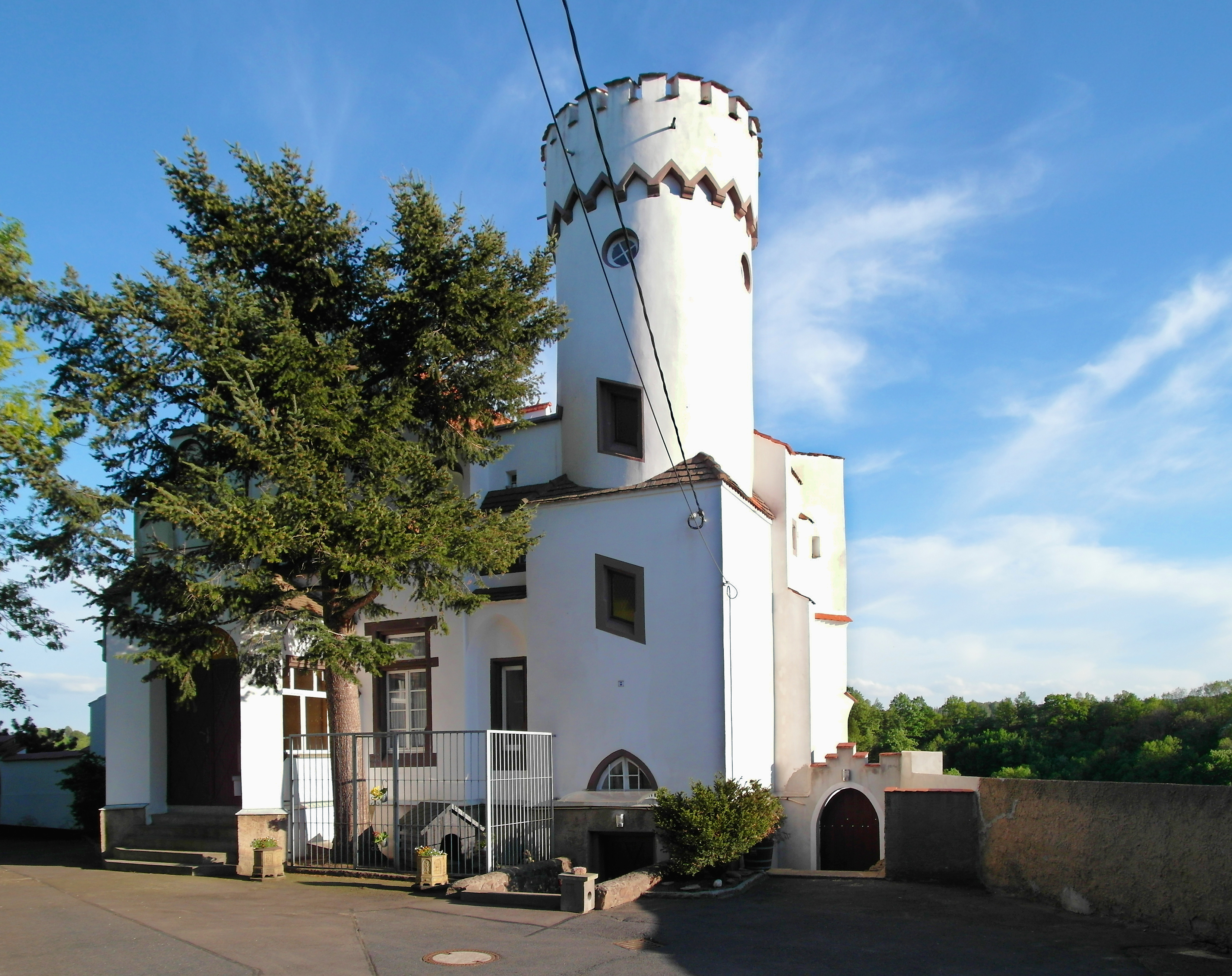 01.05.2018 01187 Dresden-Dölzschen, Wurgwitzer Straße: Die Begerburg (GMP: 51.023279,13.688878) von Nordwesten. 1852-1854 ließ der Dölzschener Gutsbesitzer Beger nach Plänen des Architekten Theodor Lehnert ein Restaurant im burgähnlichen Stil der Neogotik errichten. Die Schankkonzession wurde wegen der Absturzgefahr niemals erteilt und so wird das Gebäude bis heute als Wohnhaus genutzt. [SAM5809.JPG]20180501300DR.JPG(c)Blobelt